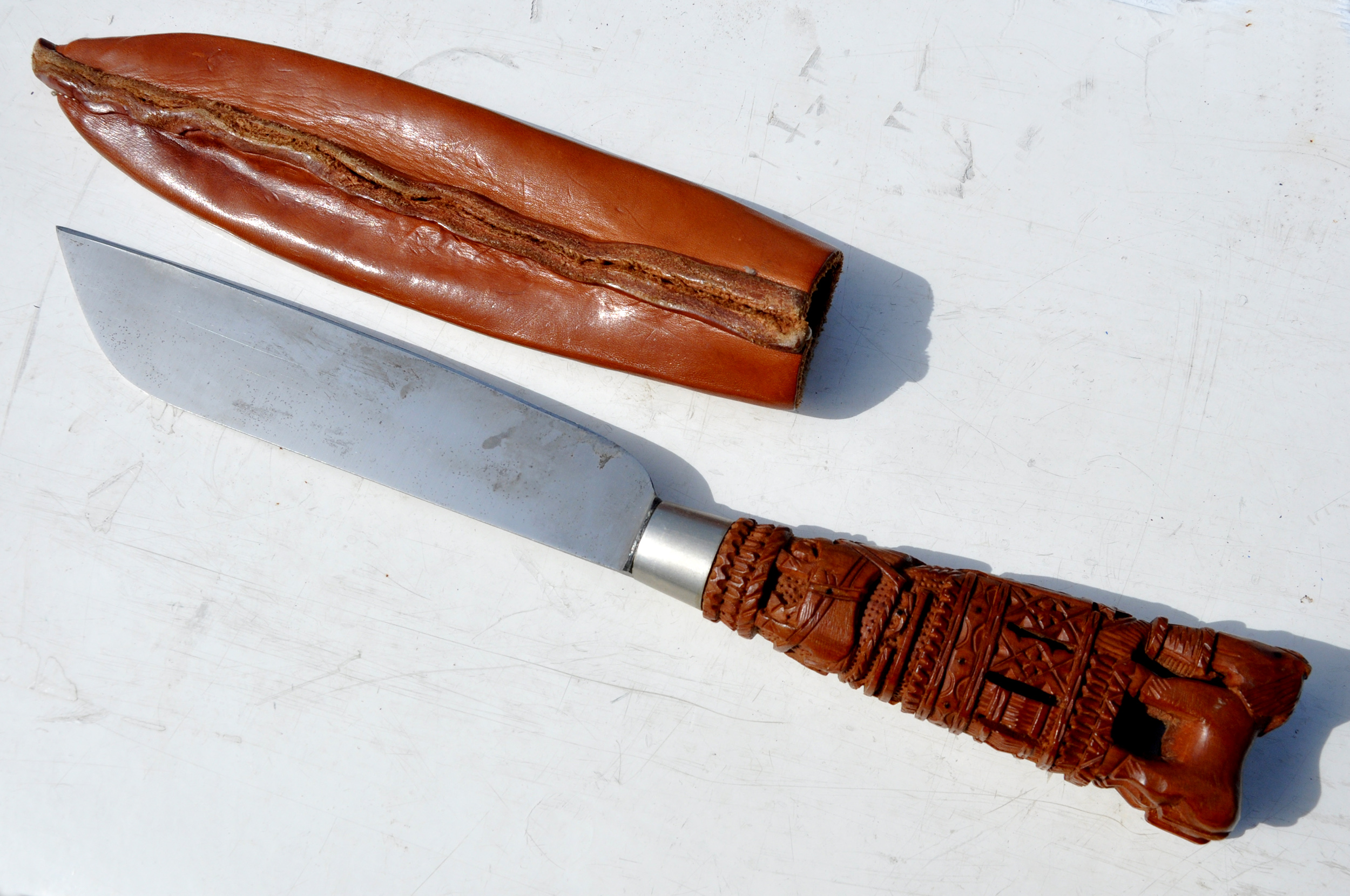 Zeeuws mes